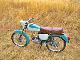 мотор на всички времена